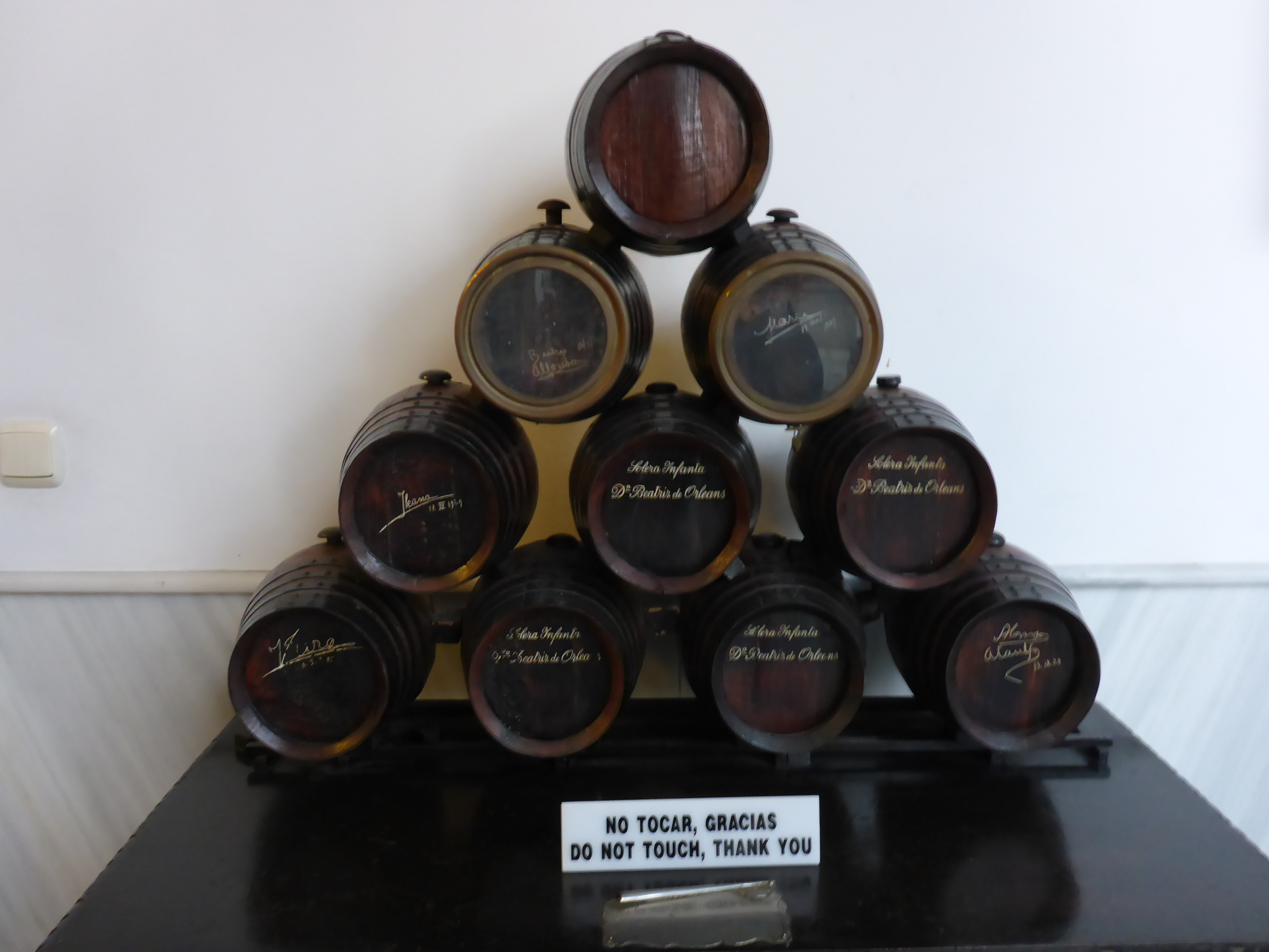 Bodegas Real Tesoro en Jerez de la Frontera